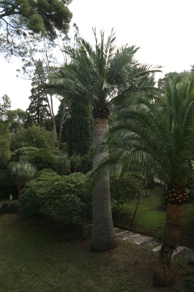 Jubaea au Plantier